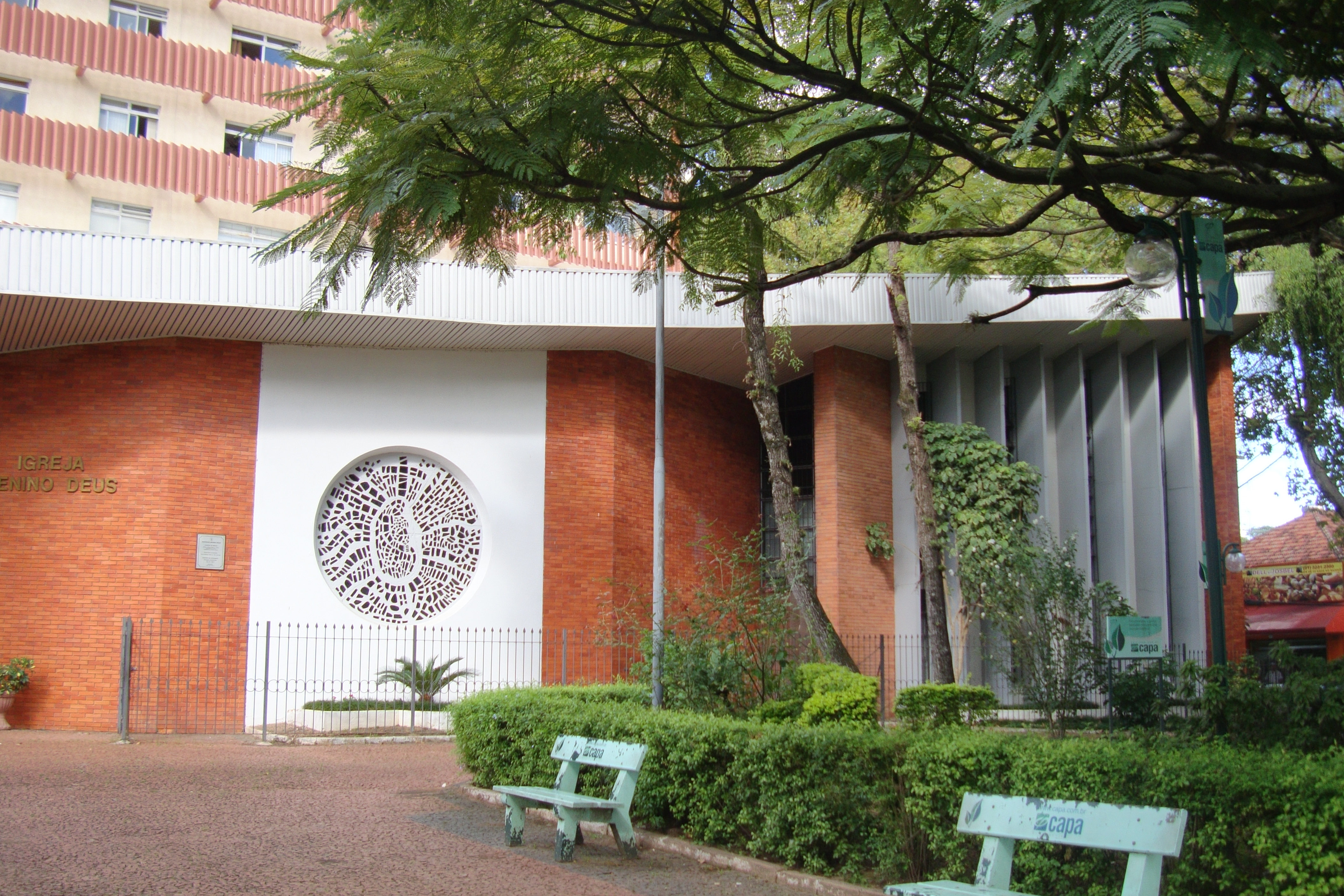 Igreja do Menino Deus em Porto Alegre, Rio Grande do Sul, Brasil